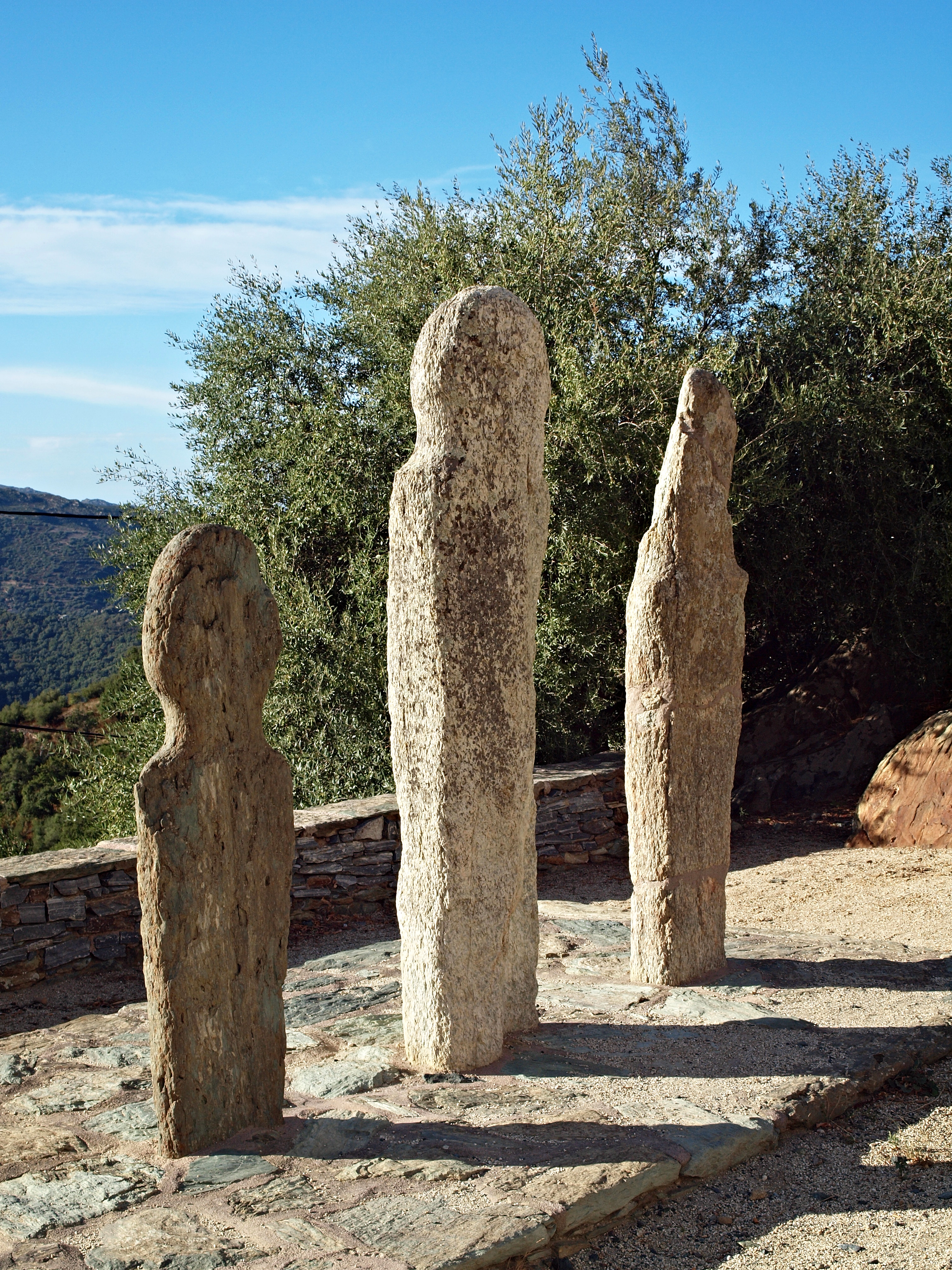 Piève, Nebbio (Corse) - Les 3 statues-menhirs placées devant l'église San Quilico